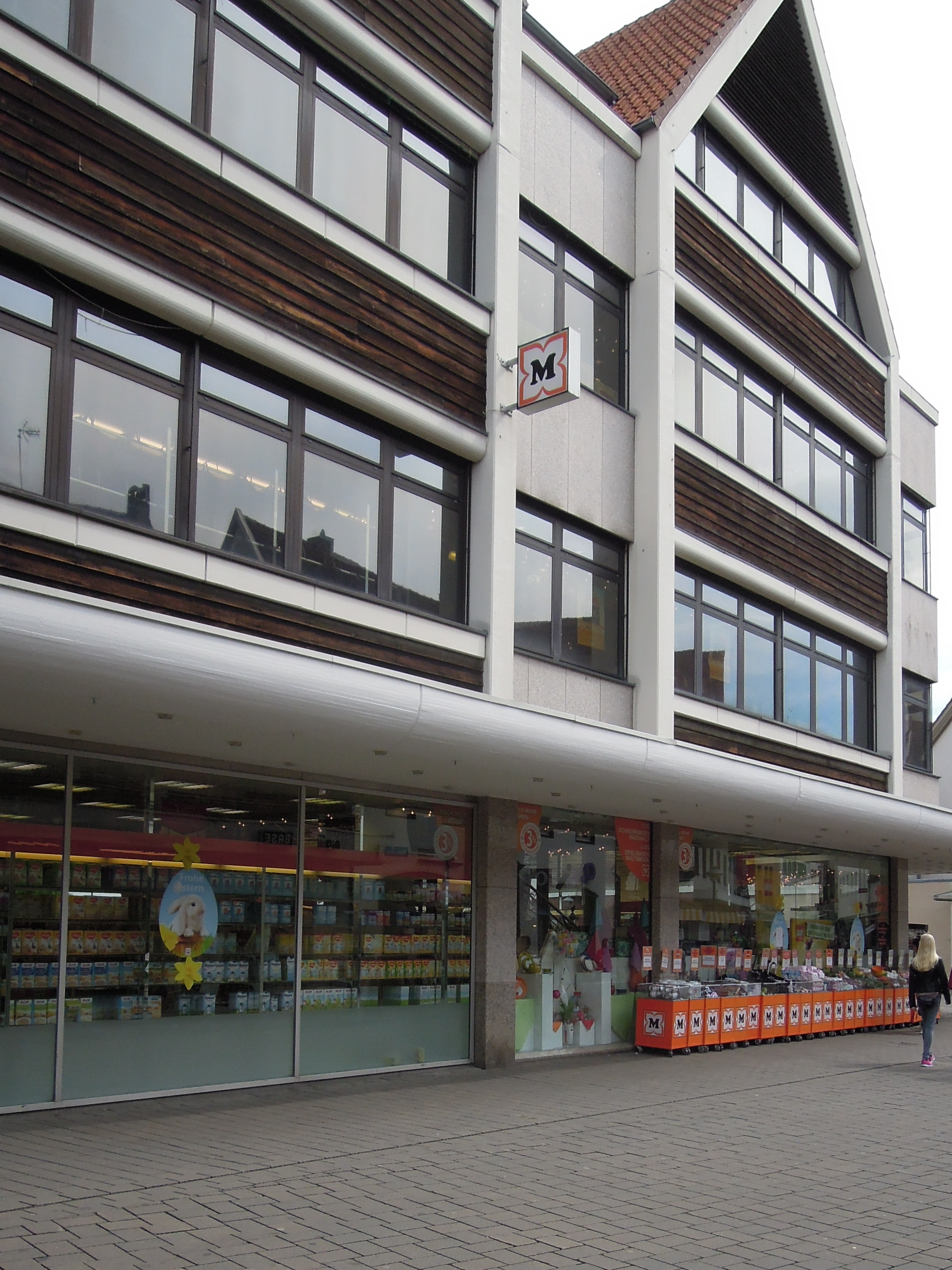 Stolpersteinlage Soest Brüderstr 36